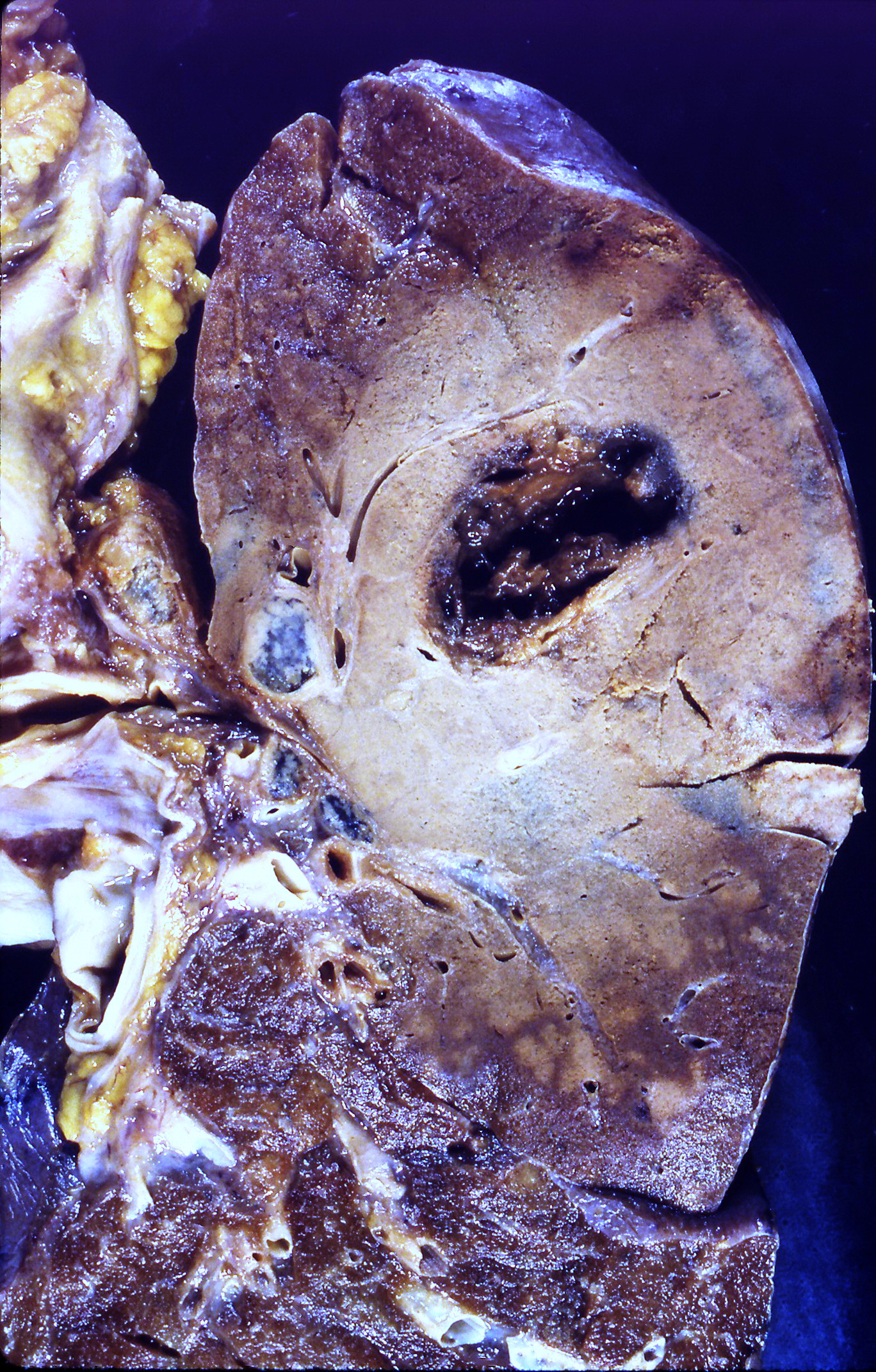 Tularemia